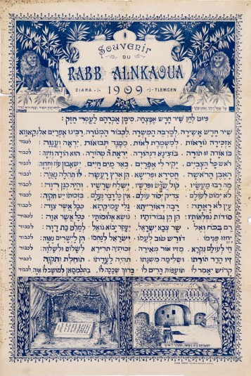 פיוט